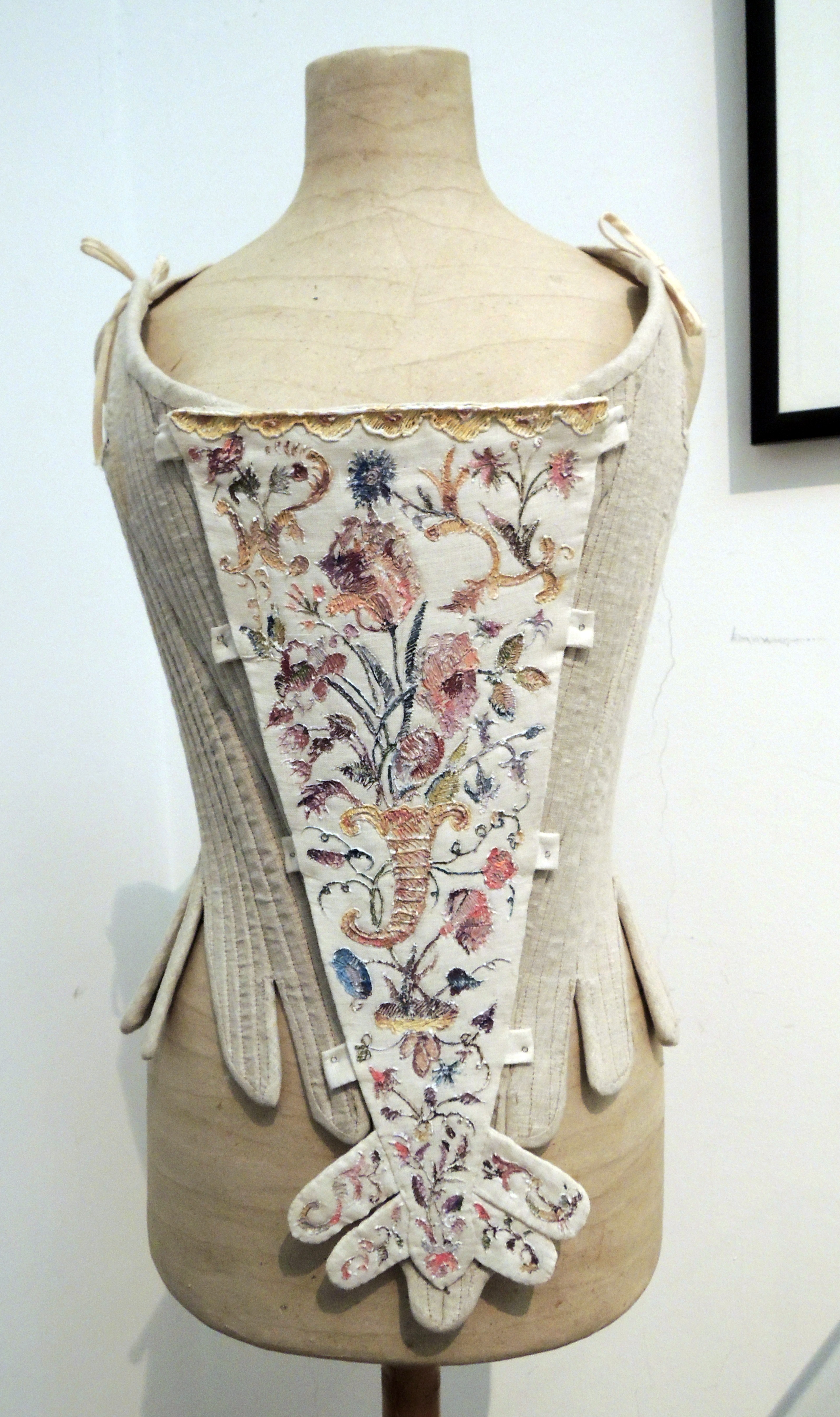 Кафедра сценического костюма, Школа-Студия МХТ. Глава кафедры - Элеонора Петровна Маклакова